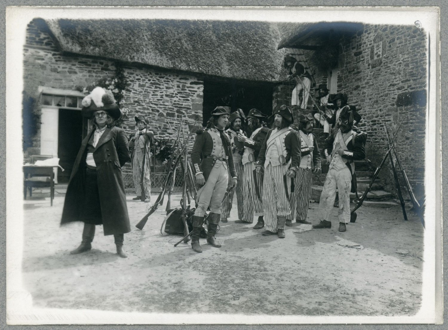 Photogramme du film. A gauche, Henri Krauss ; au centre, Paul Capellani